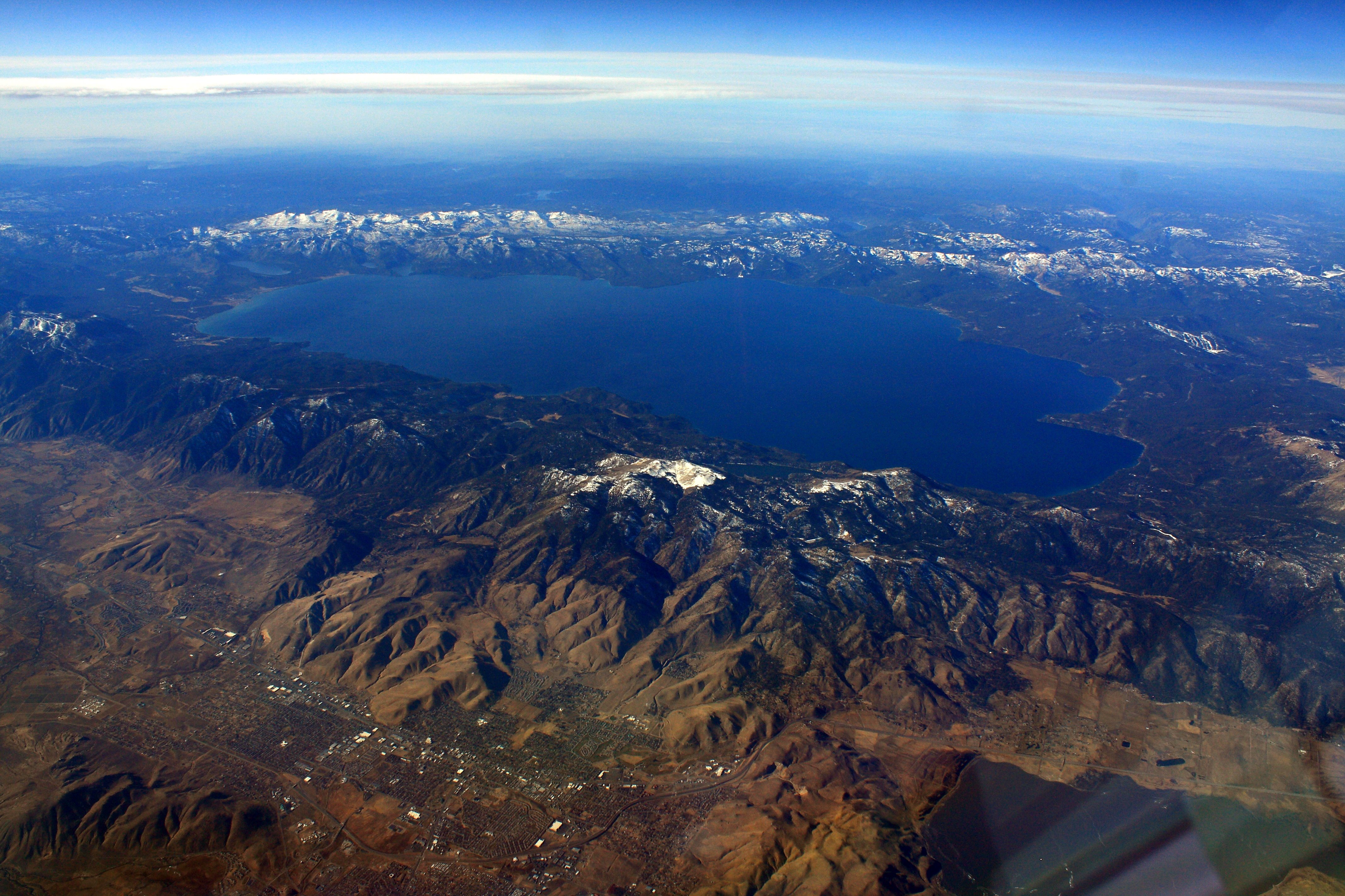 Lake Tahoe